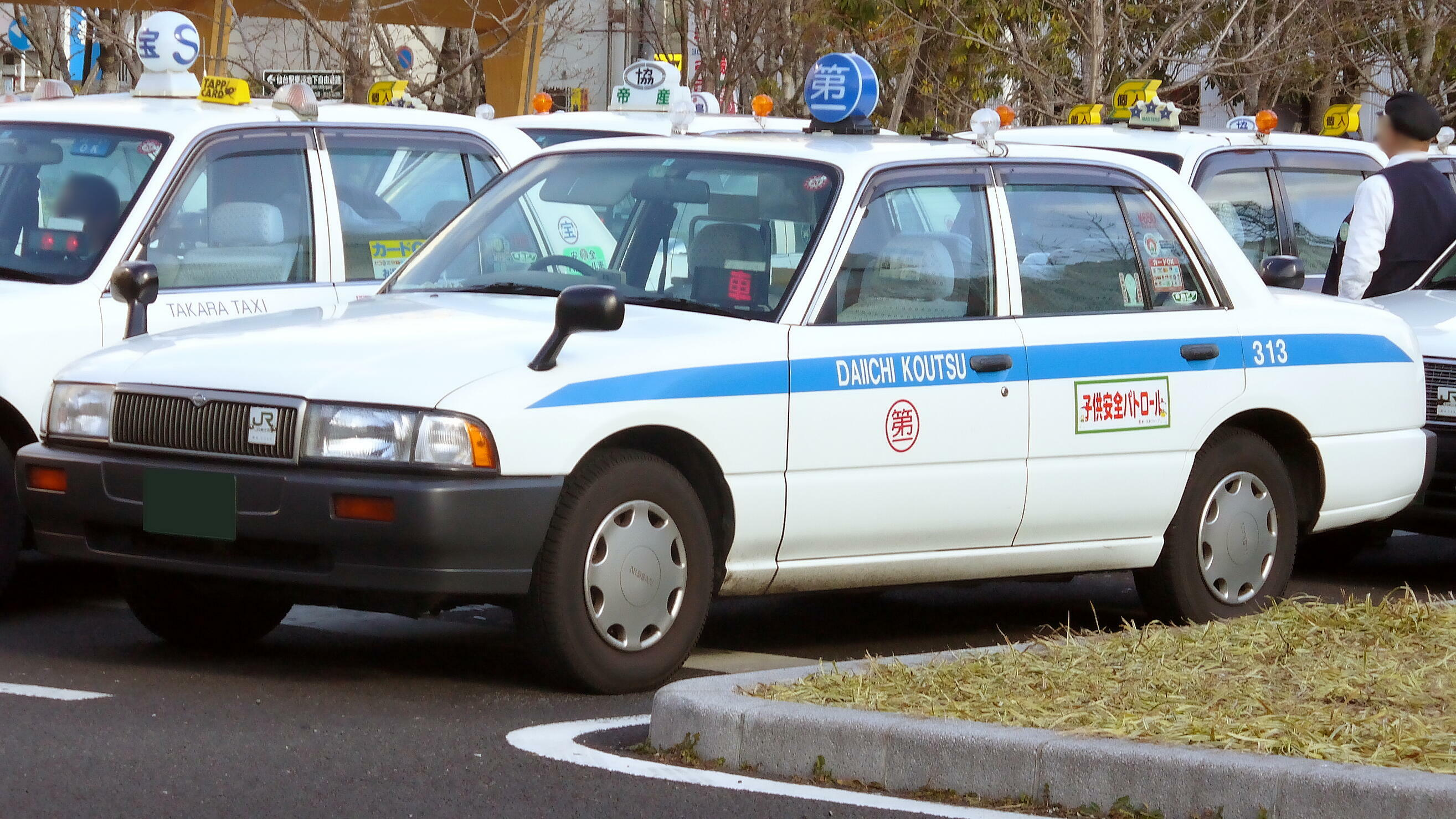 日産・クルー（第一交通産業）